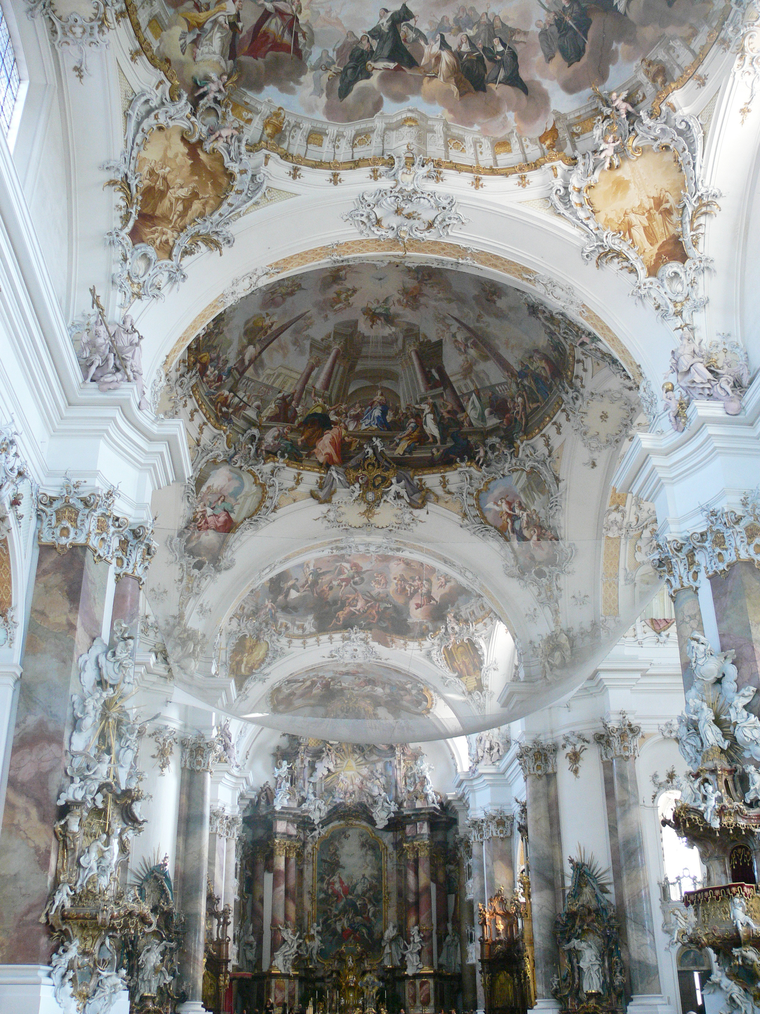 Ottobeuren, Basilika St. Alexander und Theodor: Blick vom Langhaus durch die Vierung in Richtung Chor (mit Hochaltar)